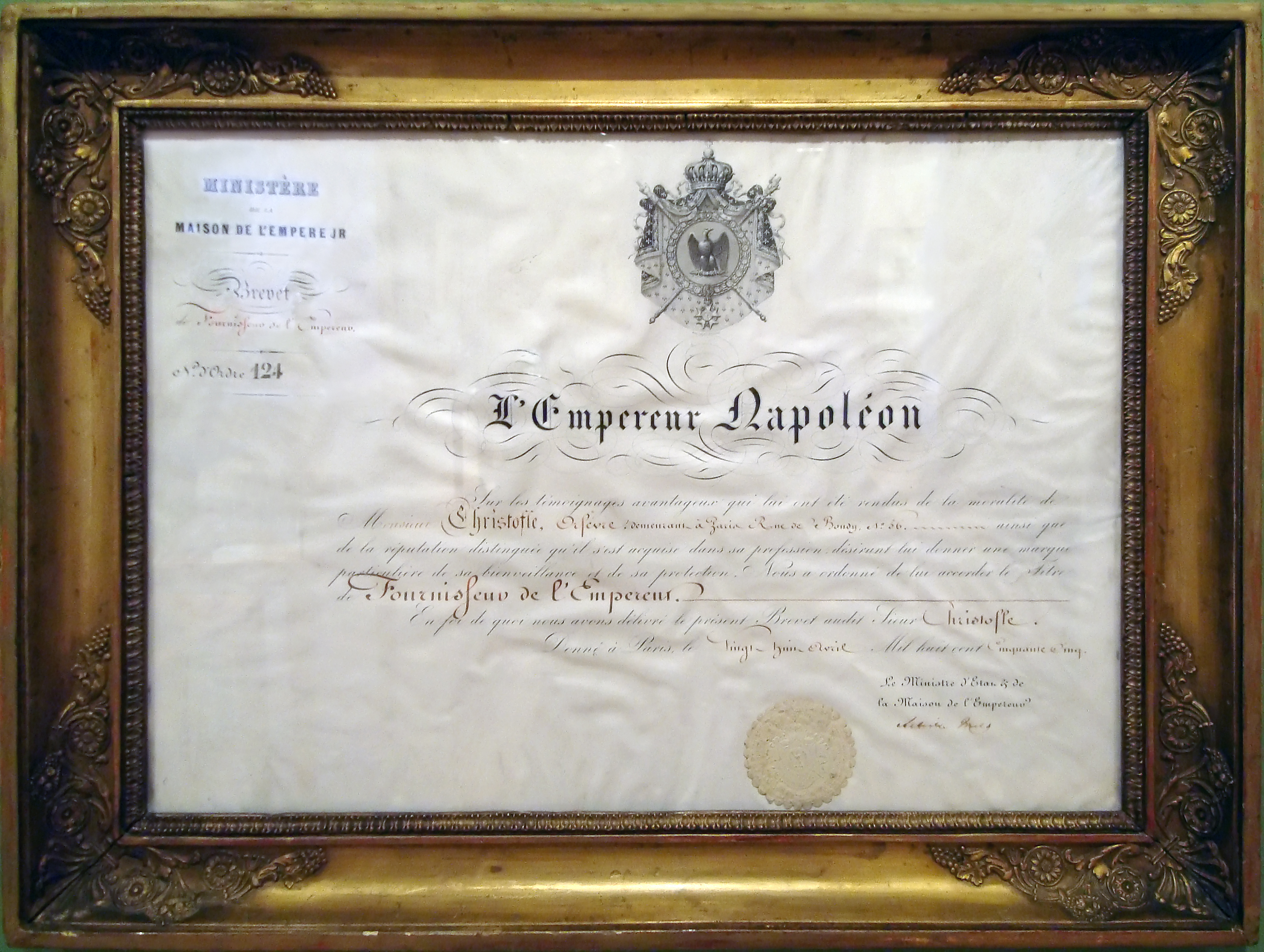 Certificat de l'Empereur Napoléon établissant Christofle comme fournisseur officiel